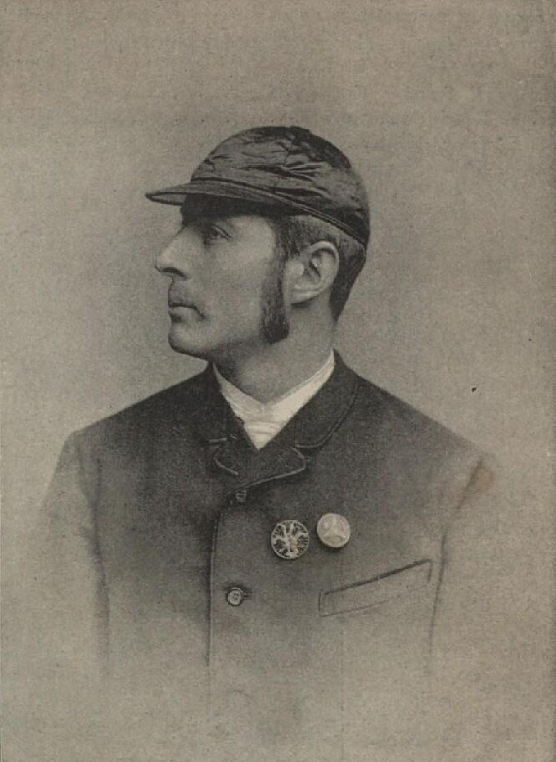 Josef Kohout (1863-1946), český cyklista